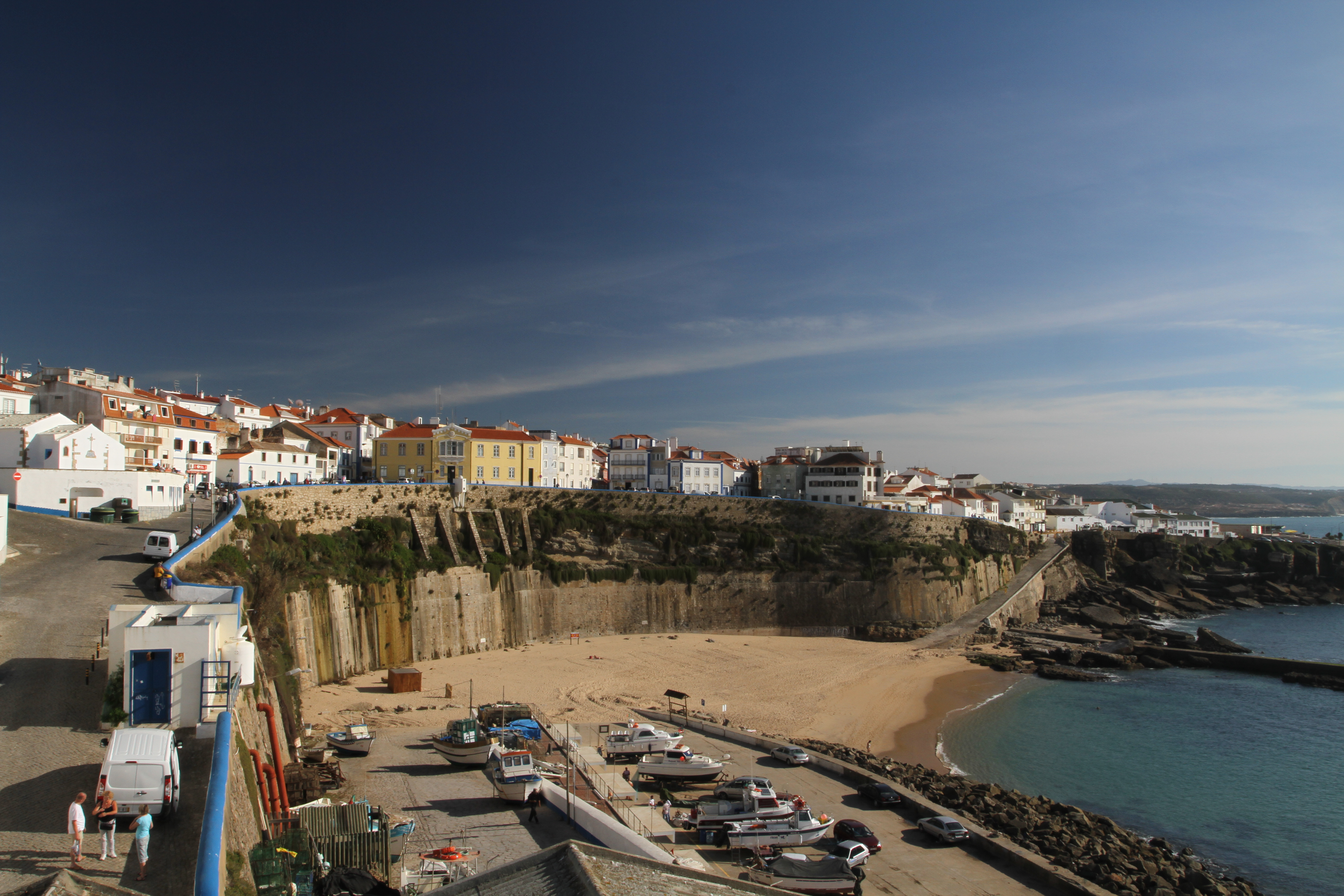 Zona envolvente ao forte Milreu This file was uploaded for Wiki Loves Monuments in Portugal with the unique identifier 72846.